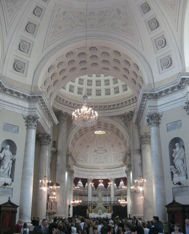 S.Maurizio, navata centrale, Porto Maurizio, Imperia (Italy)